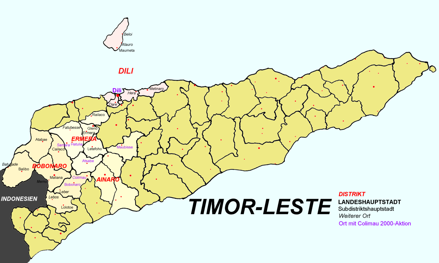 Orte in denen Aktionen von Colimau 2000 in Osttimor stattfanden, Lage von Samara nur geschätzt !